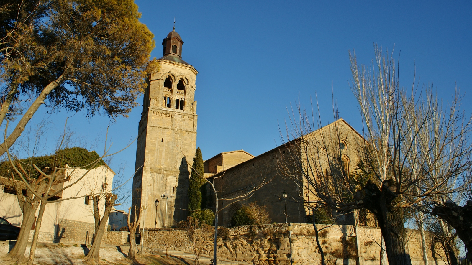 Iglesia parroquial de Alcocer, Guadalajara: estilo de transición entre el románico y el gótico